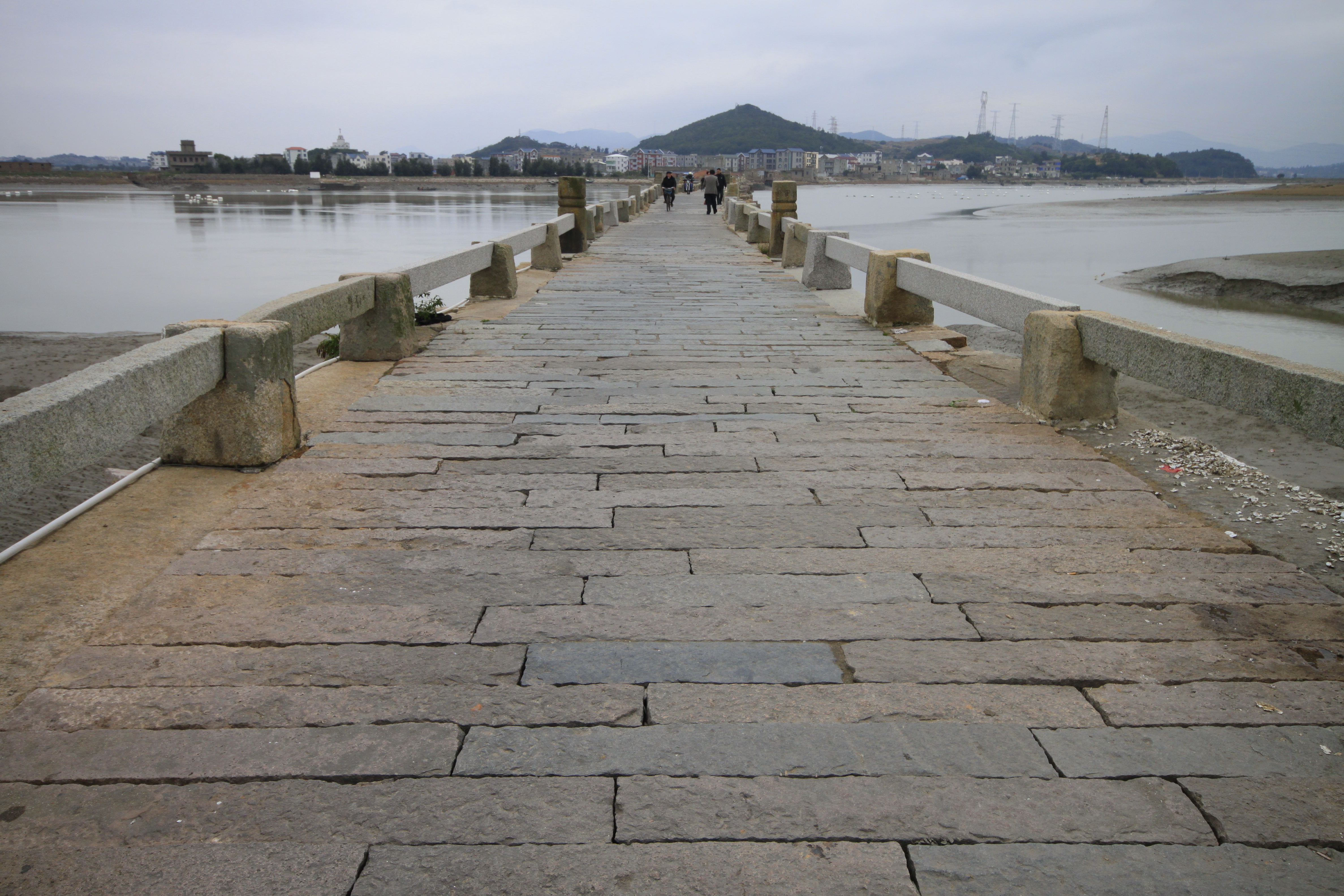 龙江桥，位于中国福建省福清市，是福建省文物保护单位。